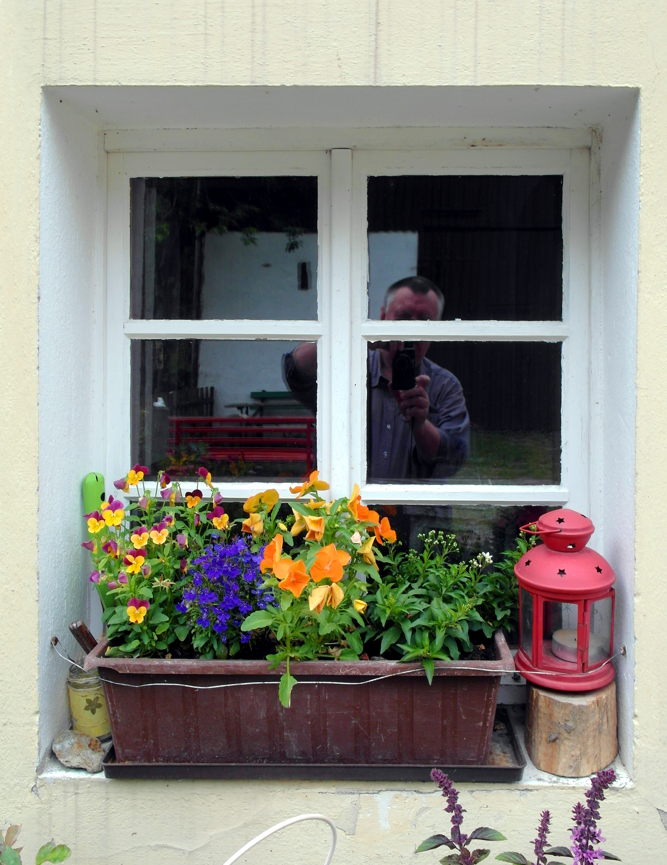 13.06.2017 01762 Reichenau (Hartmannsdorf-Reichenau), Gimmlitztal 42 : Die WeicheltMühle wurde 1807 vom Reichenauer Bauern Friedrich Gotthelf Weichelt erbaut. Wassermühle, Getreidemühle, Knochenstampfmühle. Bewirtschaftet bis 1954. Ab 2016 wird die Mühle als Wandererherberge und Mühlencafé betrieben. Fenster neben dem Eingang Hofseite. [SAM0282.JPG]20170613470DR.JPG(c)Blobelt